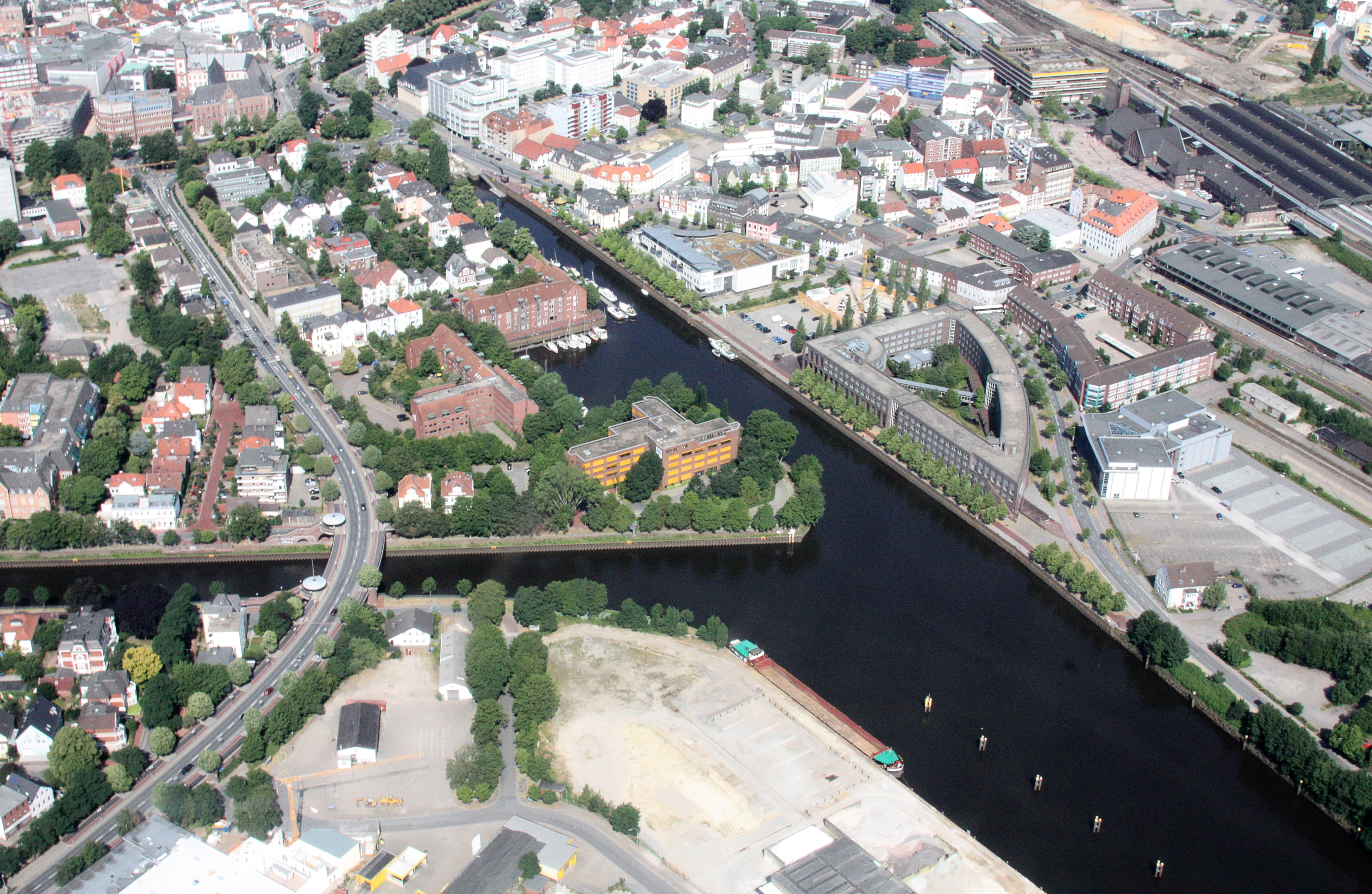 Luftaufnahmen Oldenburg (Oldenburg), mit Weiterflug nach Westen; 1500 Fuß Flughöhe; Juli 2010; Originalfoto bearbeitet: Tonwertkorrektur und Bild geschärft mit Hochpassfilter